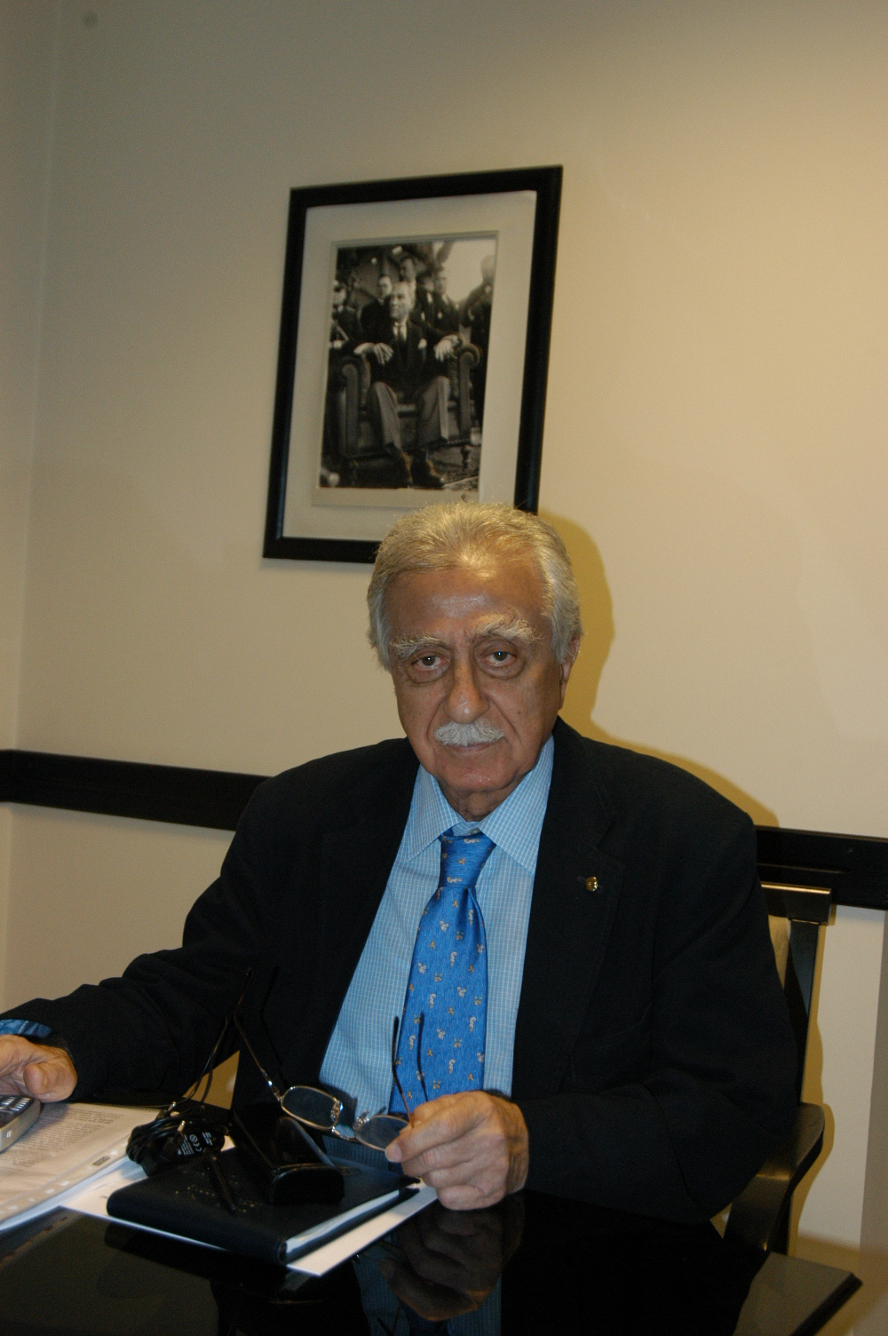 Prof. Dr. Hıfzı Özcan